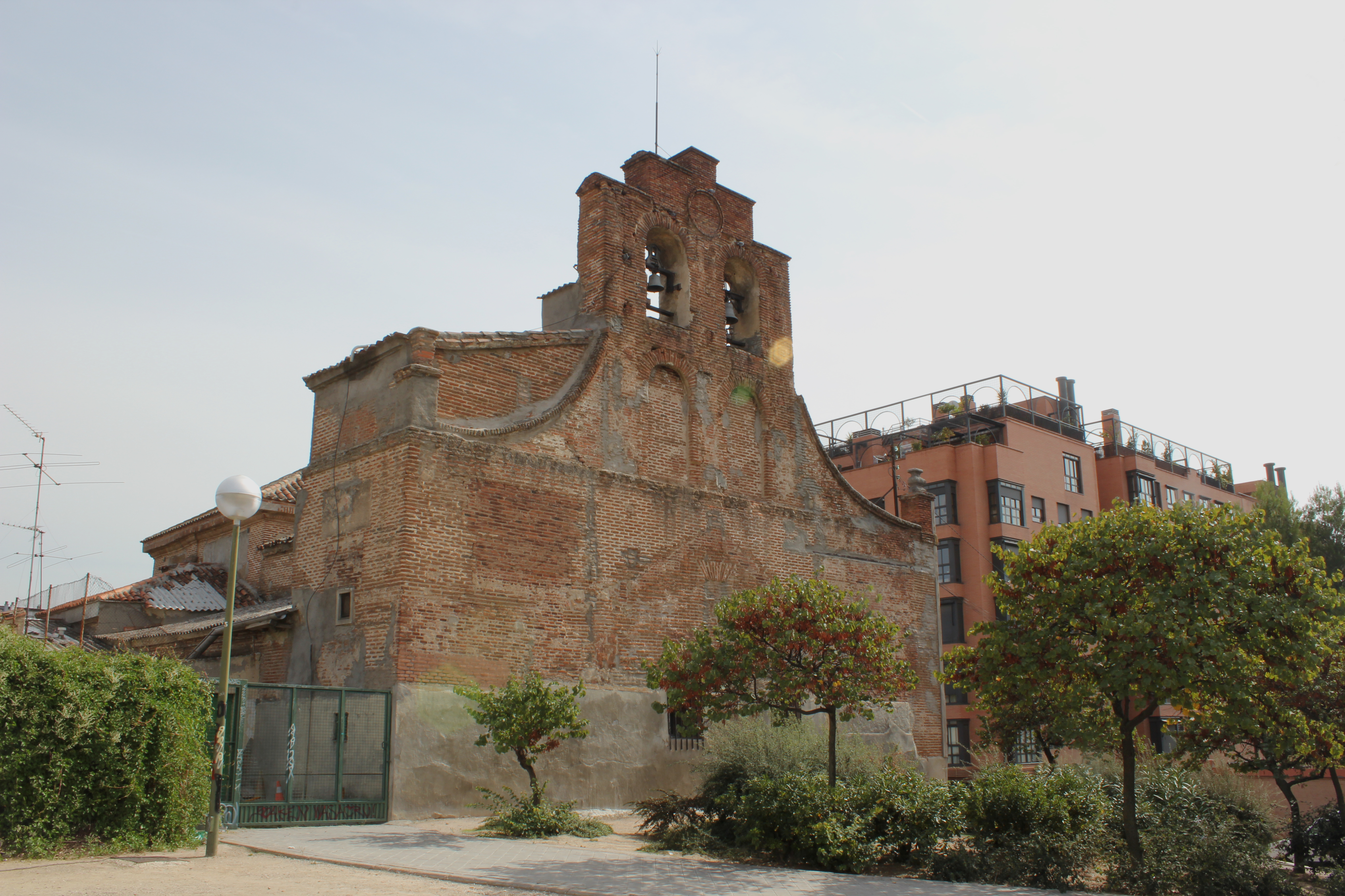 La antigua iglesia de San Juan Bautista empezó a construirse en el año 1689. Durante siglos fue la iglesia del pueblo de Canillas. Posterioremente, se convirtió en la parroquia de Santa Paula y actualmente, en la ermita de San Blas.